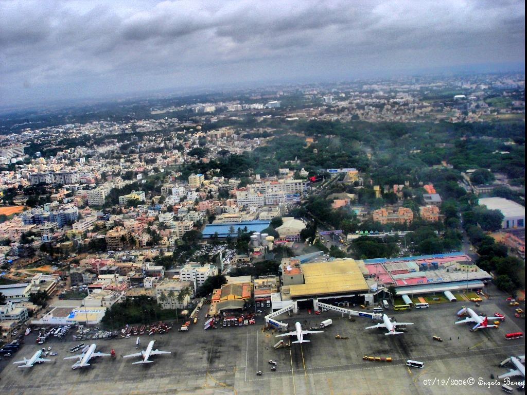 Staré letiště v Bengalúrú, Indie